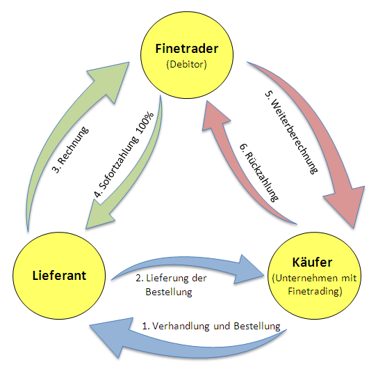 Grafische Darstellung des Prozessablaufes bei Finetrading